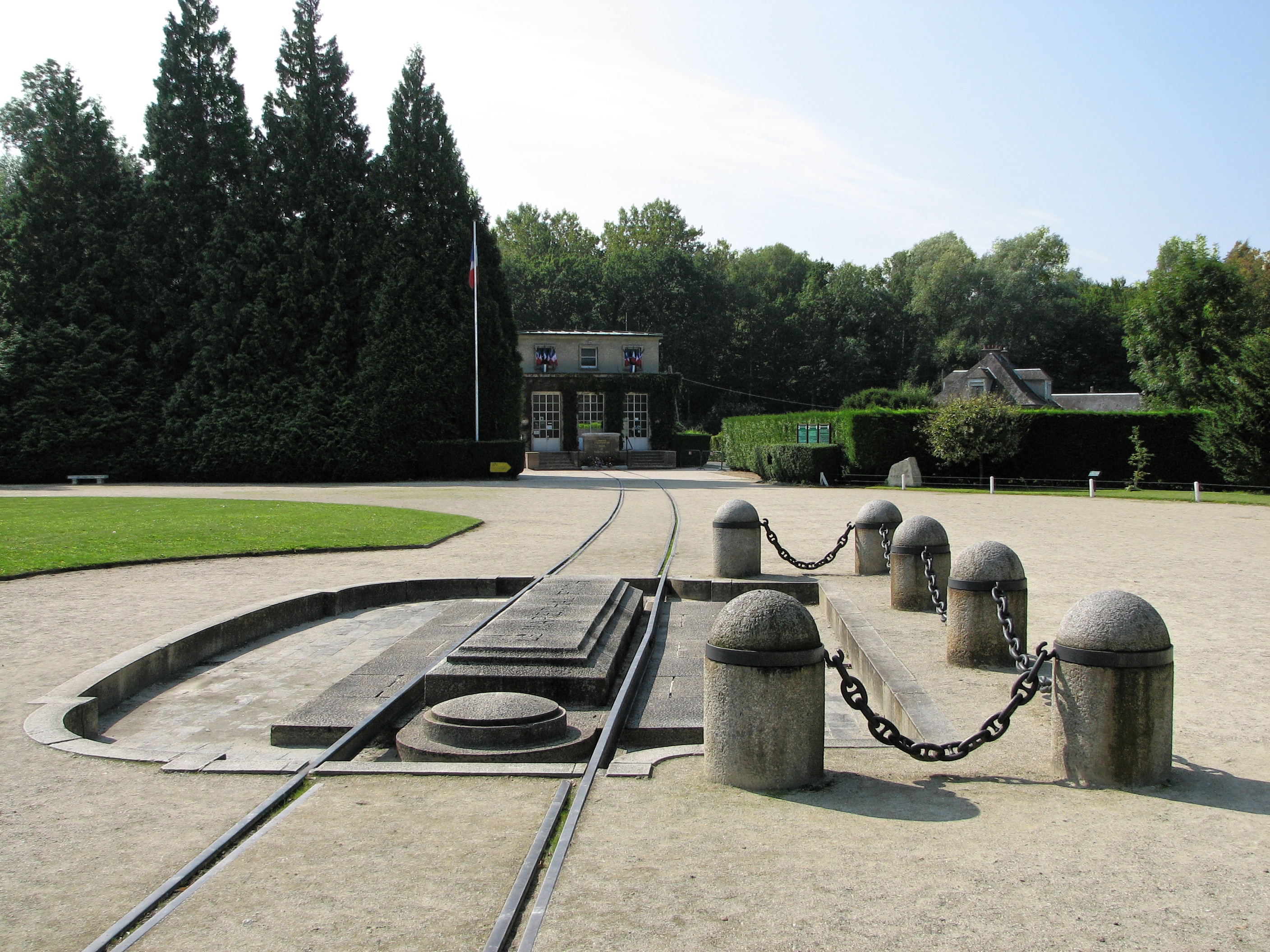 Clairière de l'Armistice, appelée aussi clairière de Rethondes. Au premier plan, l'emplacement où se trouvait le wagon de l'Armistice, au second plan, le musée de l'Armistice qui abrite un wagon identique.